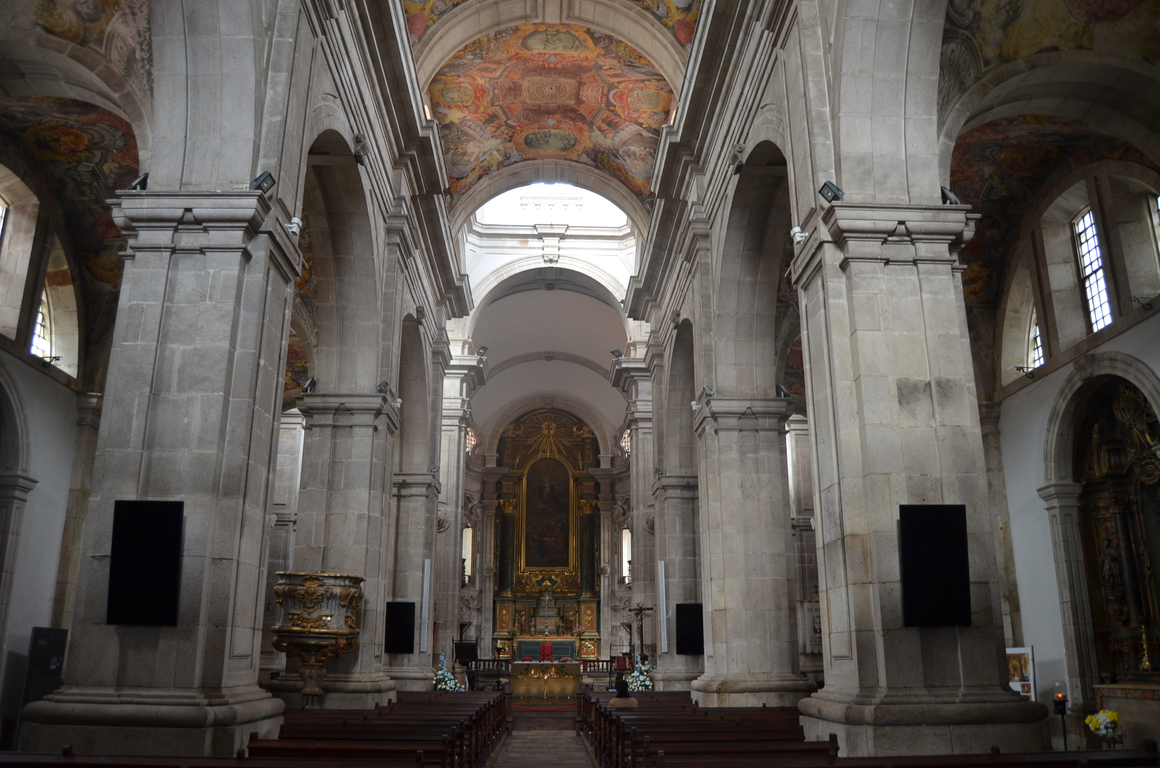 Lamego